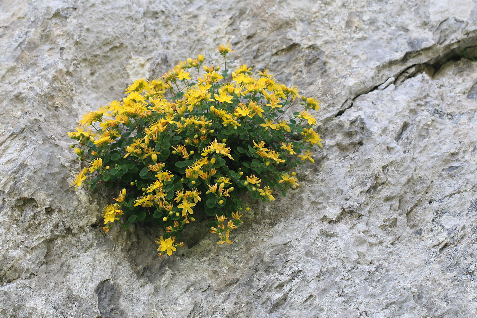 Millepertuis à feuilles rondes (Hypericum nummularium), La Pierre Saint-Martin, France